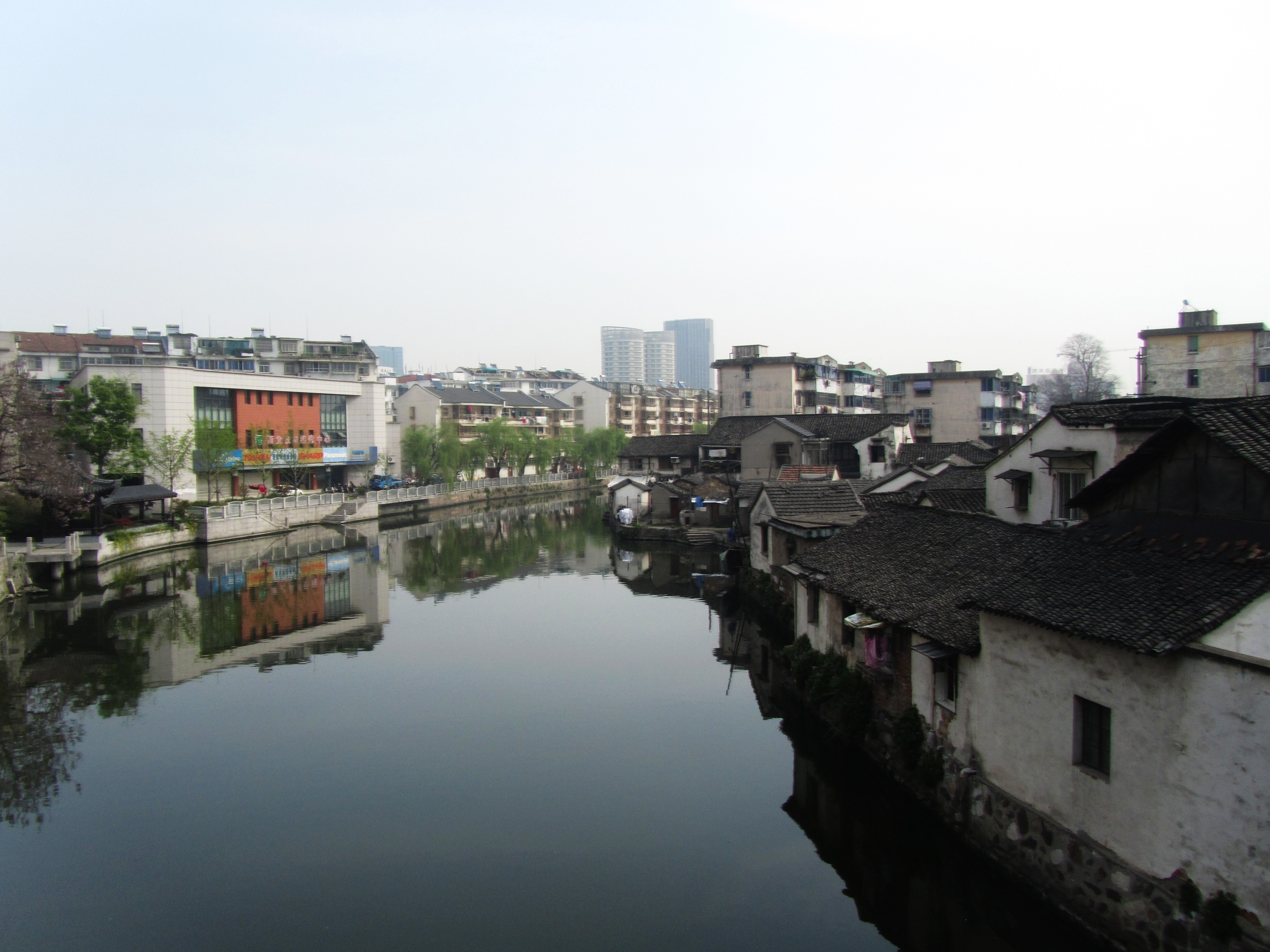 潮音桥，自桥上向北看霅溪。